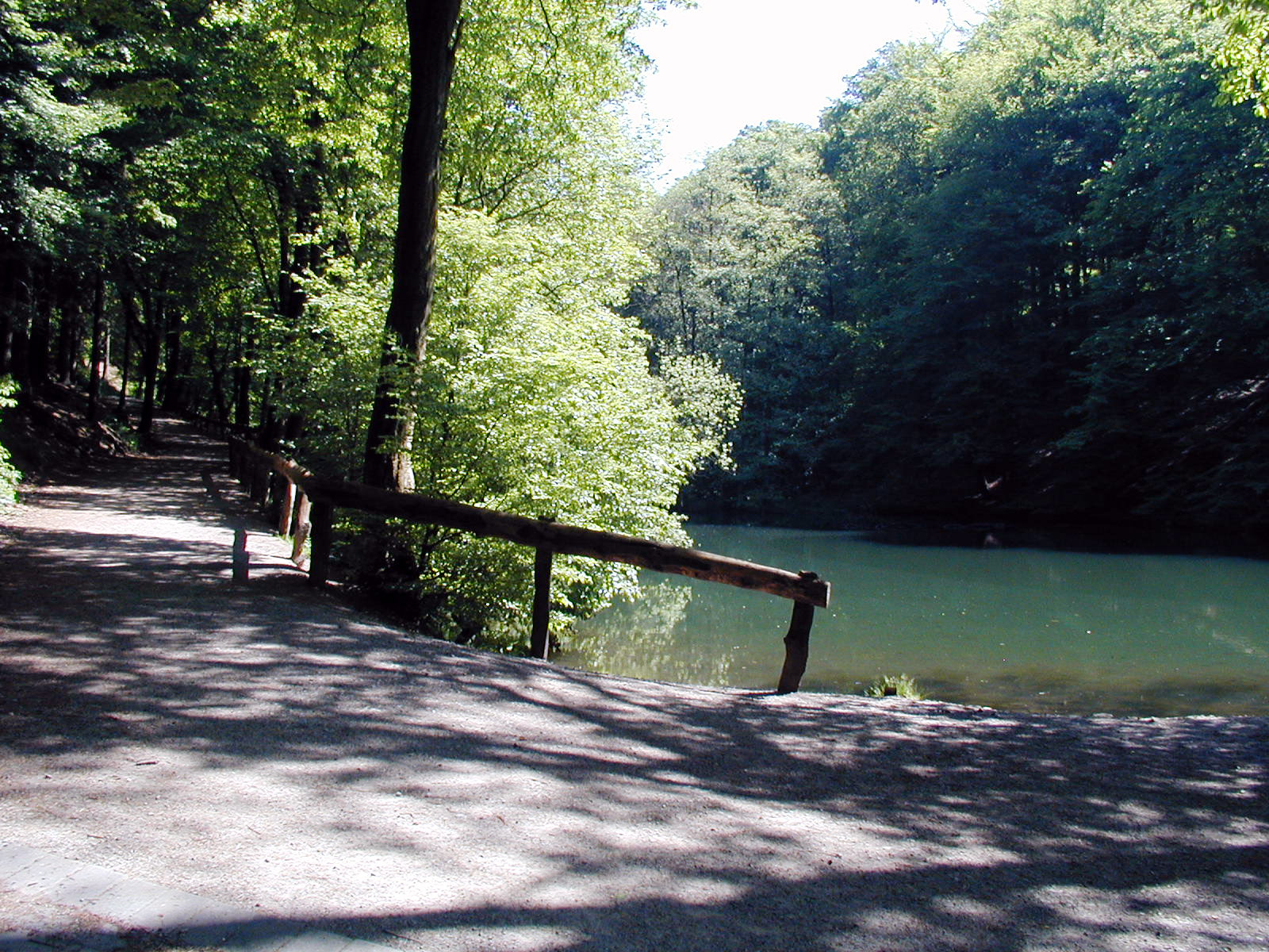 Stauteiche am Saalbach (Wuppertal), 2001 selbst fotografiert